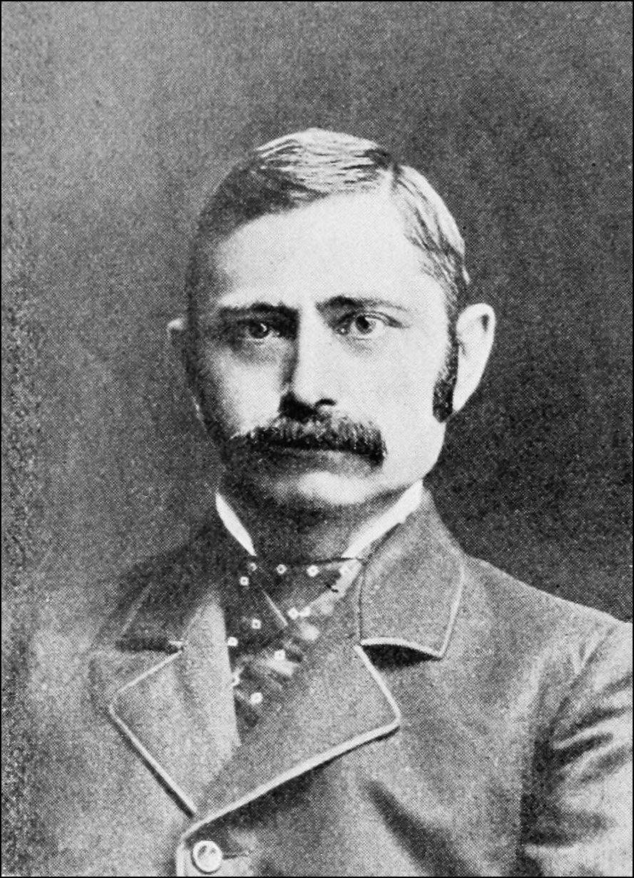 Albert S Gatschet anthropologist